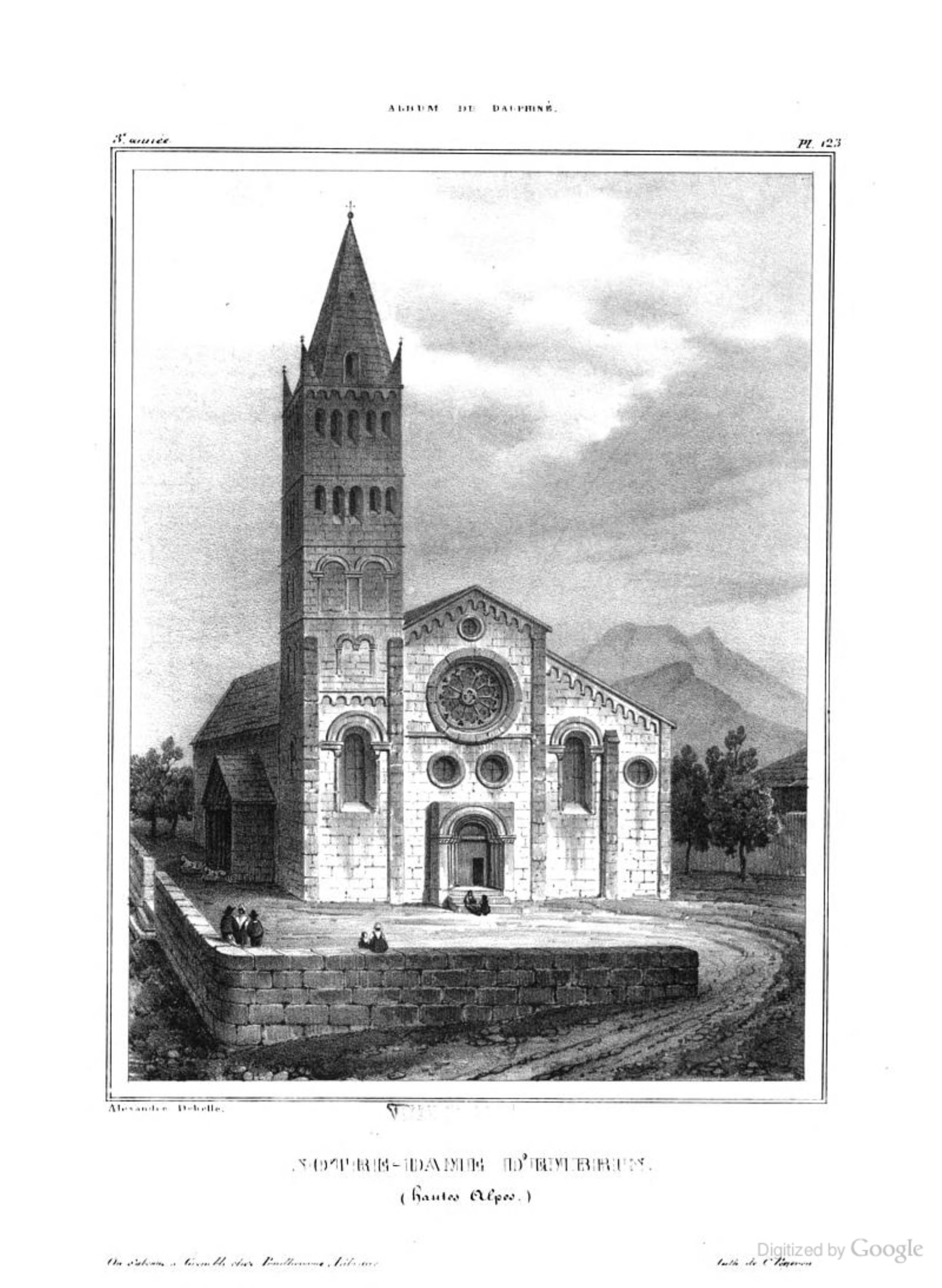 Album du Dauphiné - tome III, litographie. Cathédrale Notre-Dame d'Embrun, Hautes-Alpes.